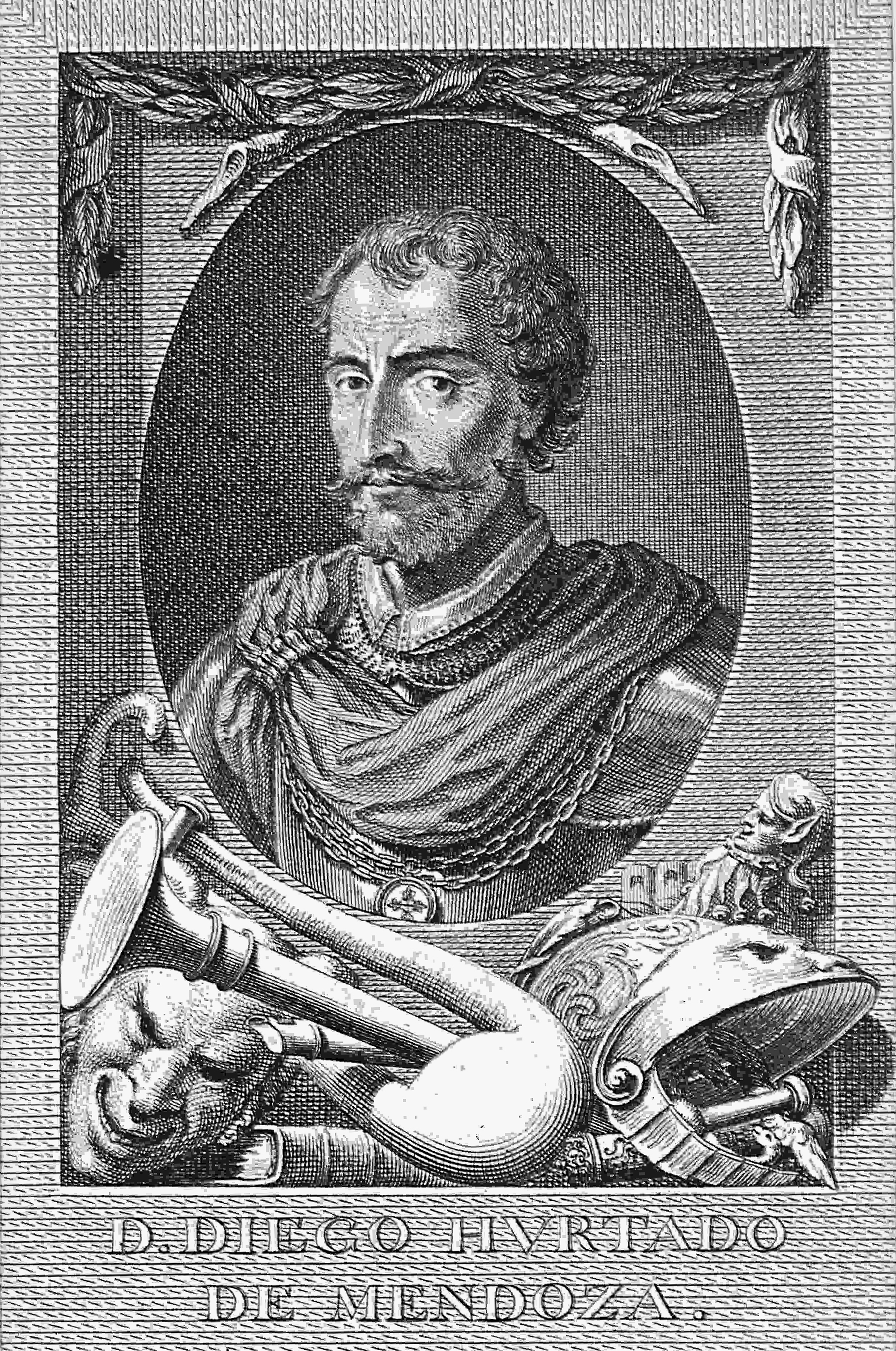 Retrato de Diego Hurtado de Mendoza (poeta y diplomático español, 1505-1575).